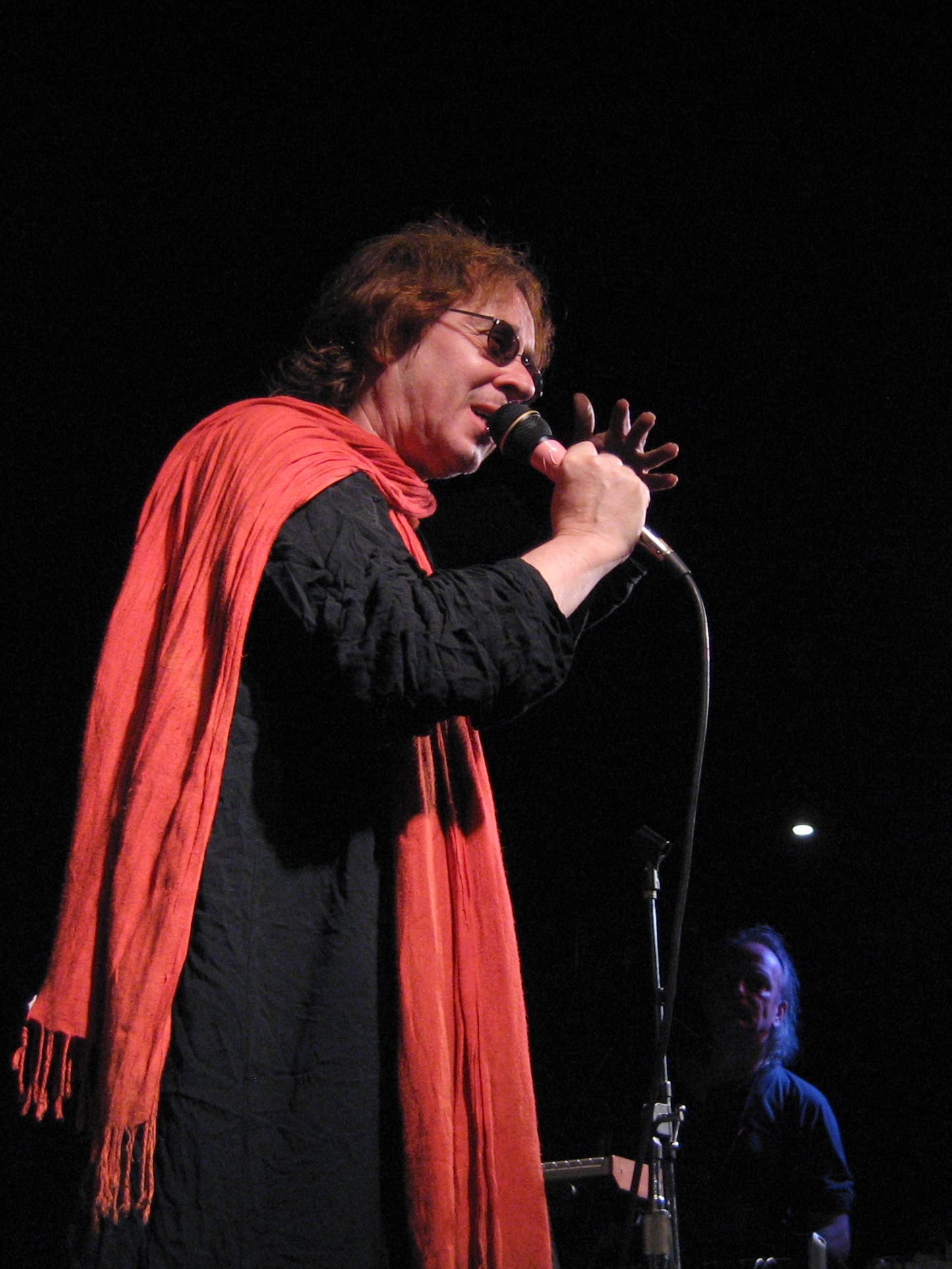 Edward Ka-Spel